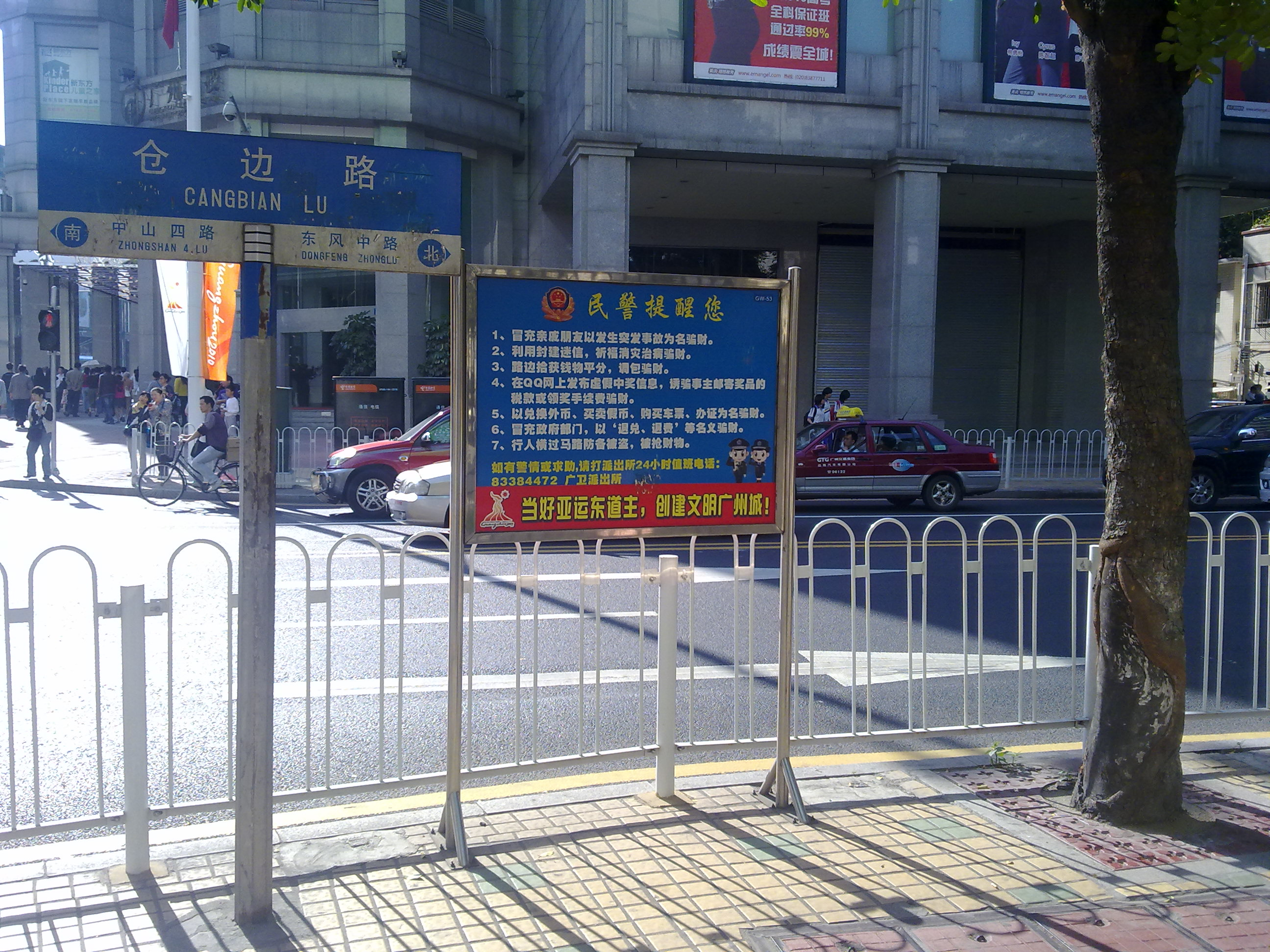 廣州市越秀區倉邊路